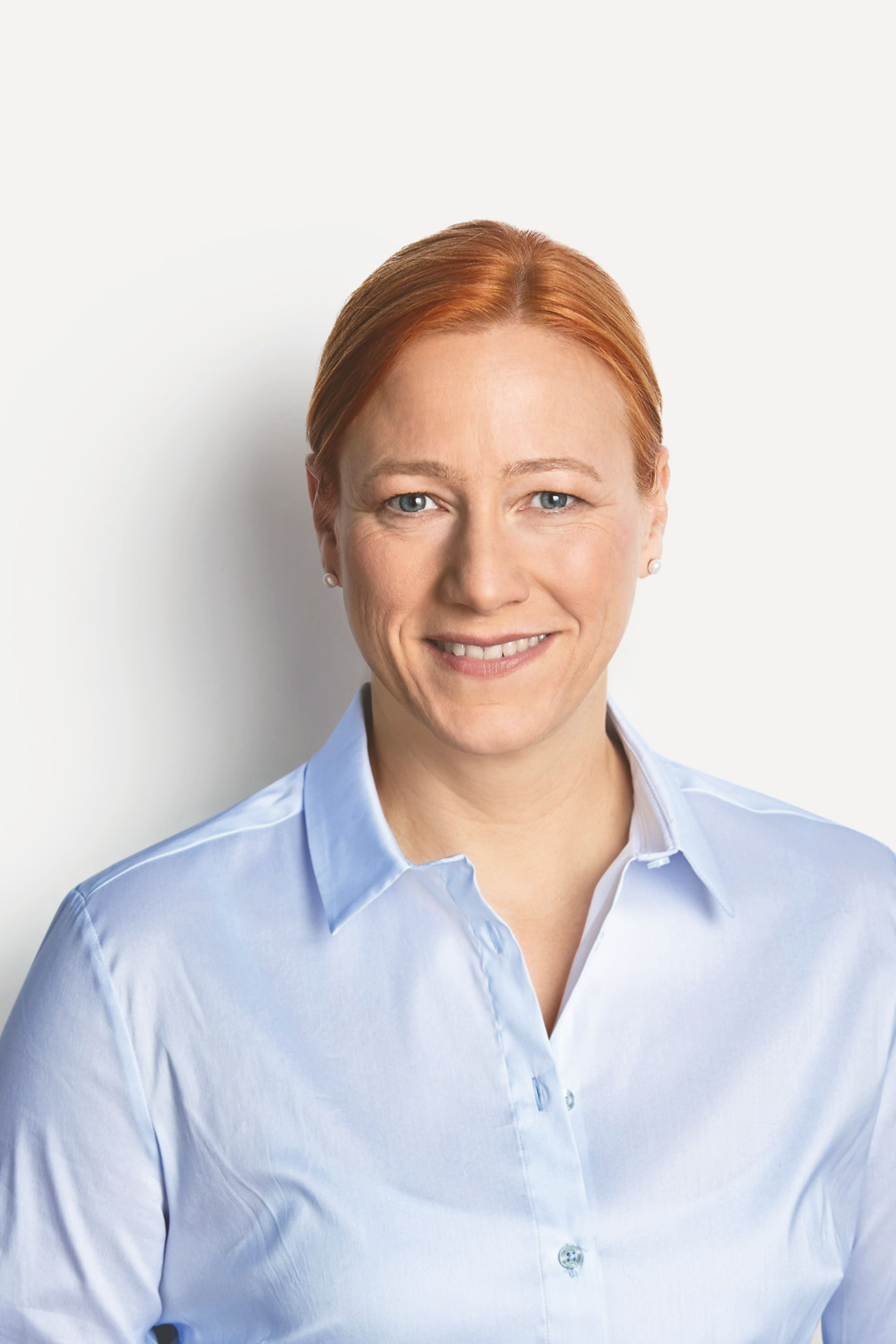 Dagmar Schmidt, MdB / Kandidatinnenfoto zur Bundestagswahl 2017